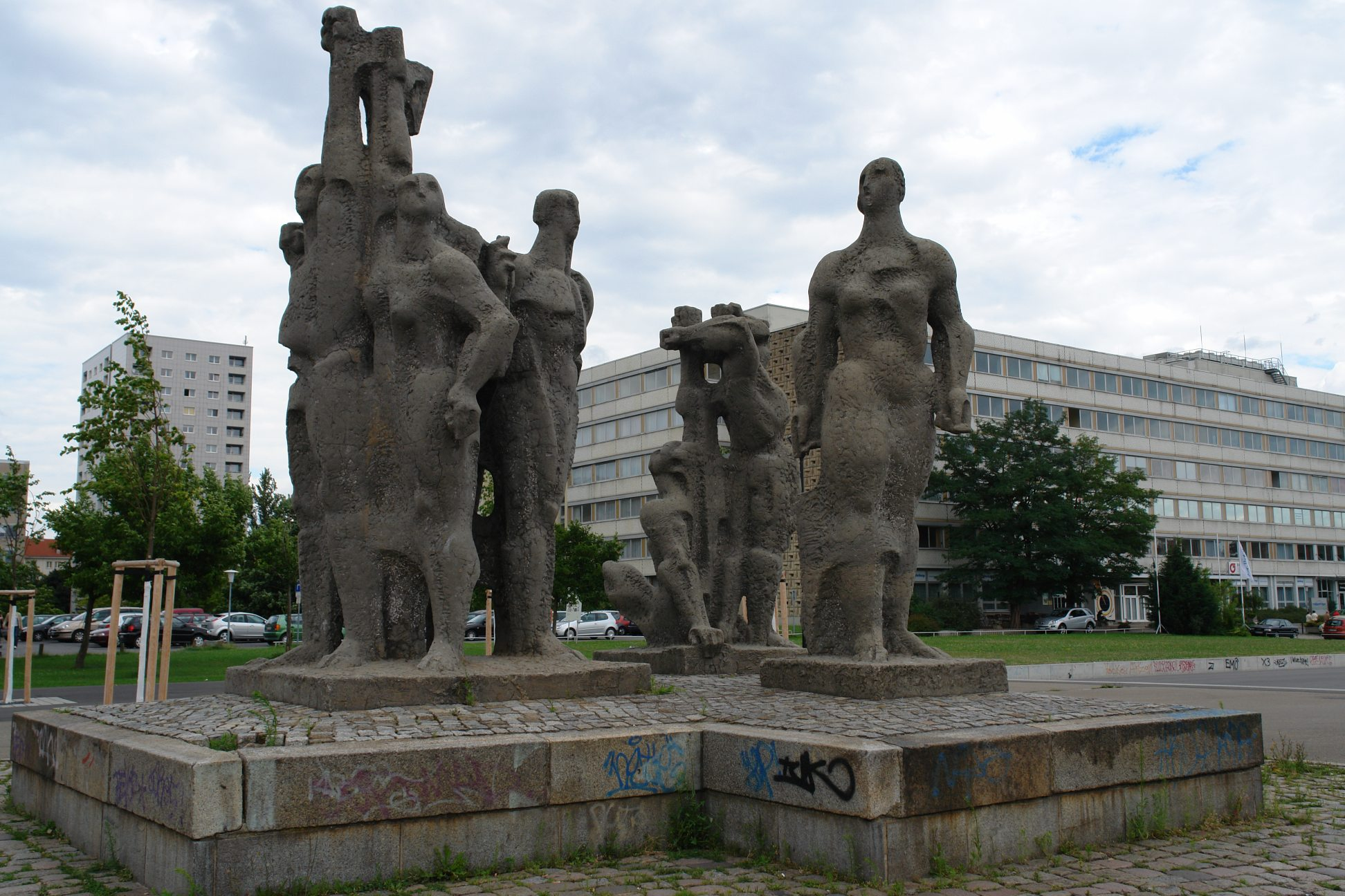 Denkmal Proletarischer Internationalismus an der Lingnerallee, Dresden.